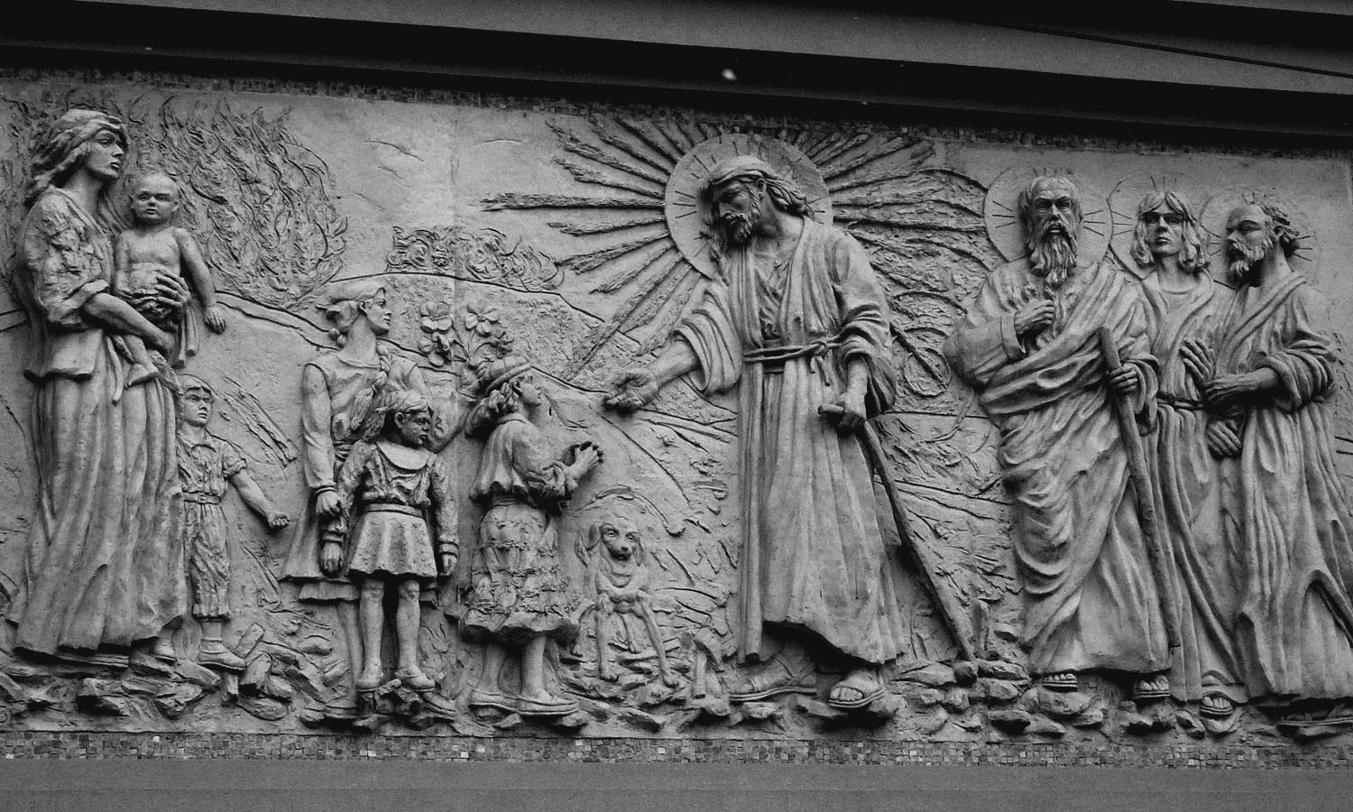 Kościół NMP Królowej Polski w Myślachowicach, płaskorzeźba z sztucznego kamienia na fasadzie autorstwa Zbigniewa Wąsiela